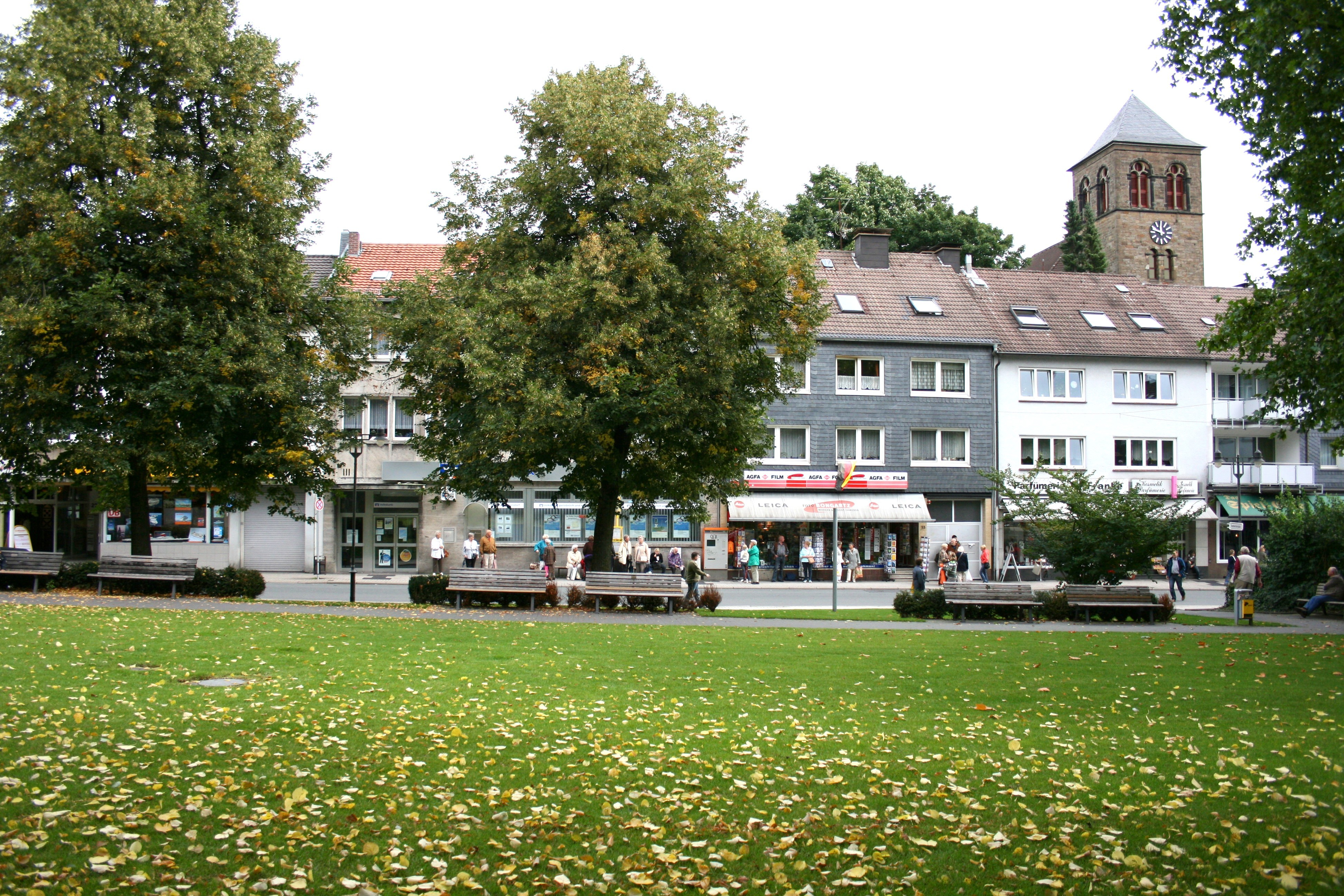 Wuppertal-Ronsdorf: Marktwiese